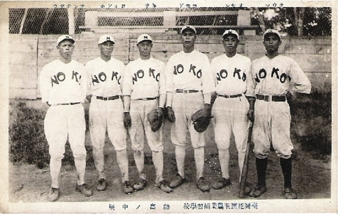 中文（台灣）: 右二為阿仙，守備位置為二壘手，赴日改名「稻田照夫」，就讀日本京都府平安中學、法政大學。後來在日東京中野經營米店。 右三為辜茂得，守備位置為捕手，後來進入農會工作。 右三為紀薩，守備位置為外野手，赴日改名「西村嘉造」，就讀日本京都府平安中學。 左一為杉提揚。